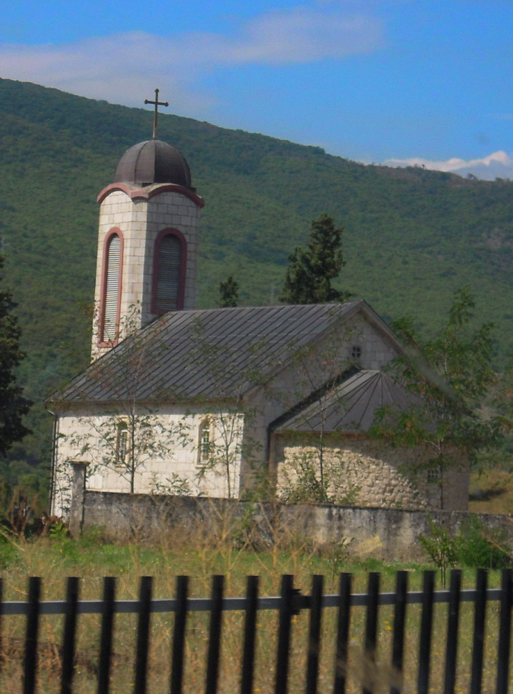 Православна_црква_у_Потоцима_(Мостар)